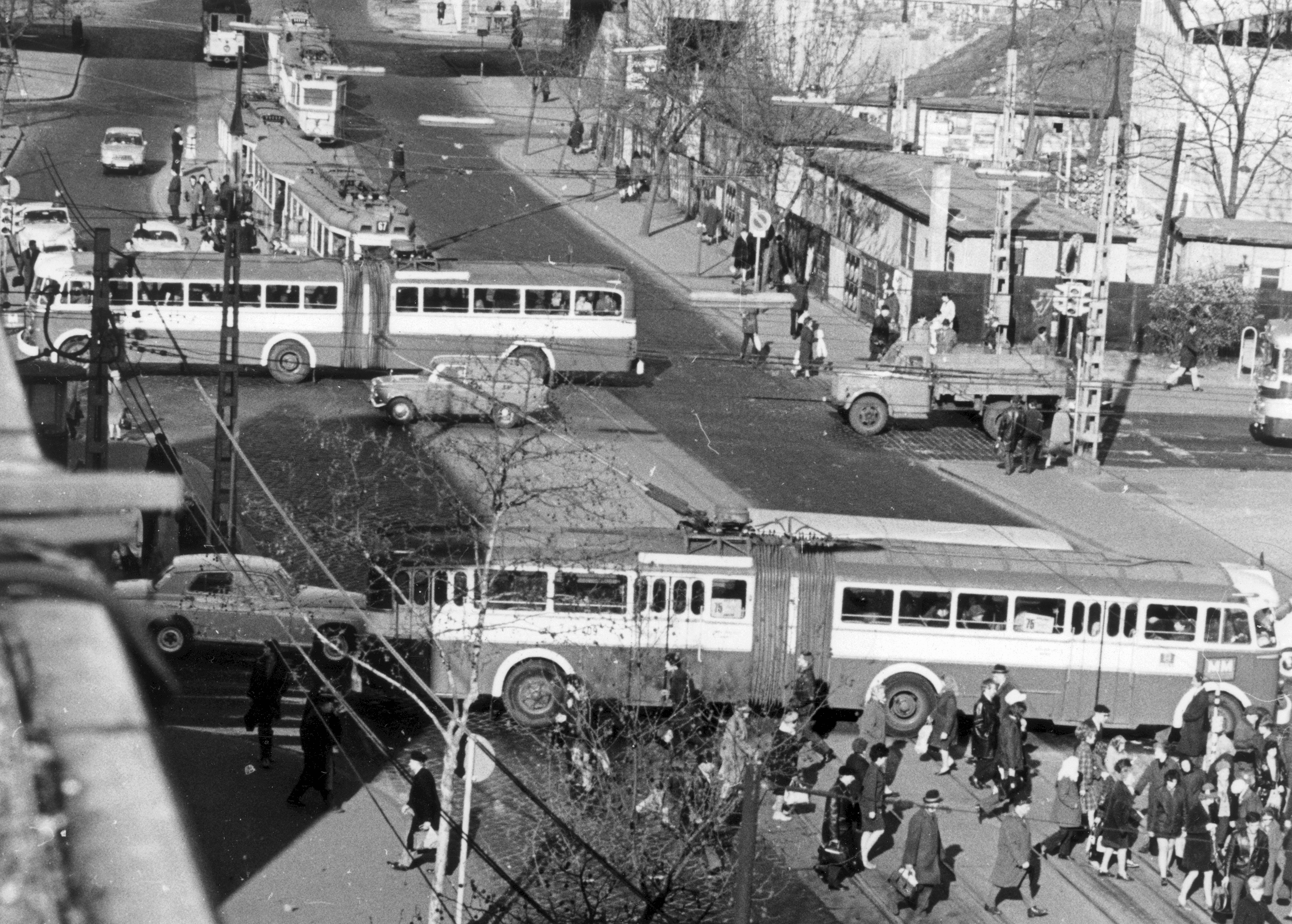 Hungária körút - Thököly út kereszteződése. Location: Hungary, Budapest XIV. Tags: trolley bus, Ikarus-brand, Ikarus 60T articulated, Hungarian brand, traffic, commercial vehicle, Budapest Title: Hungária körút - Thököly út kereszteződése.